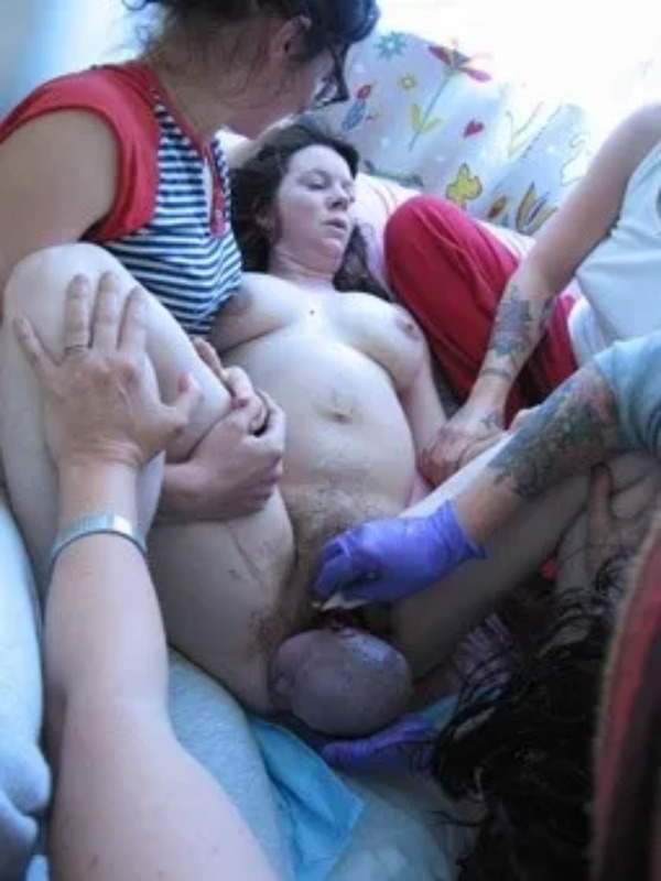 Mājdzemdības.